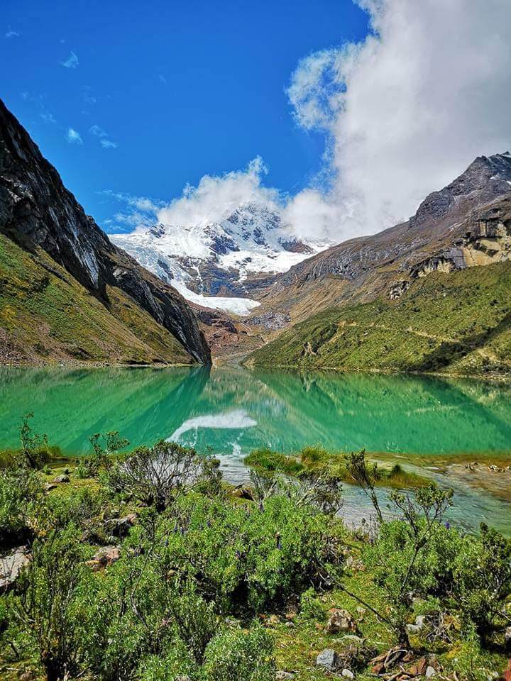 Laguna Minoyo, Qda. Honda, Distrito de Marcará, Provincia de Carhuaz, Ancash, Peru